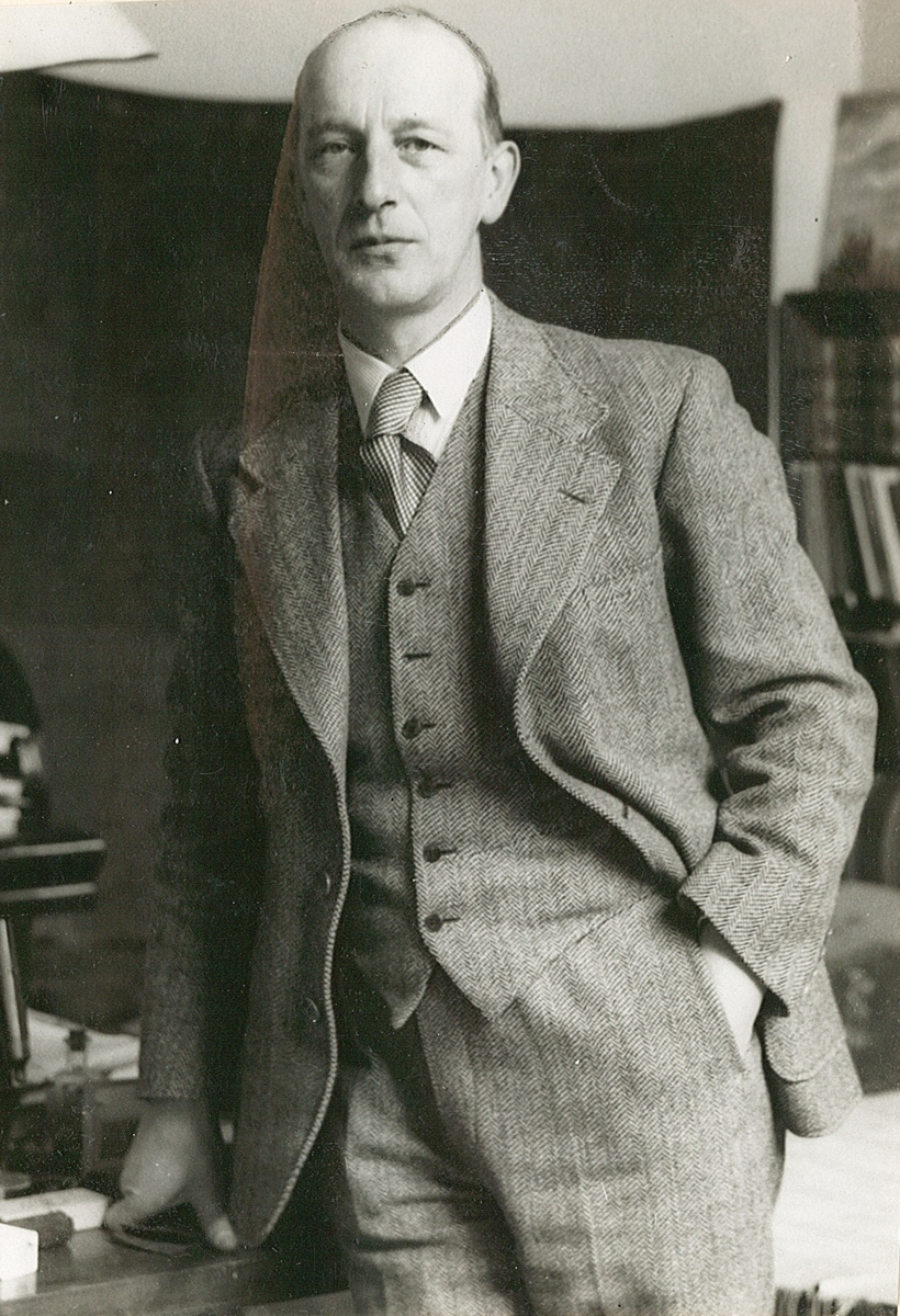 Hugo Lous Mohr. Ukjent fotograf, ca. 1930–40. Fra Byhistorisk samling hos Oslo Museum.